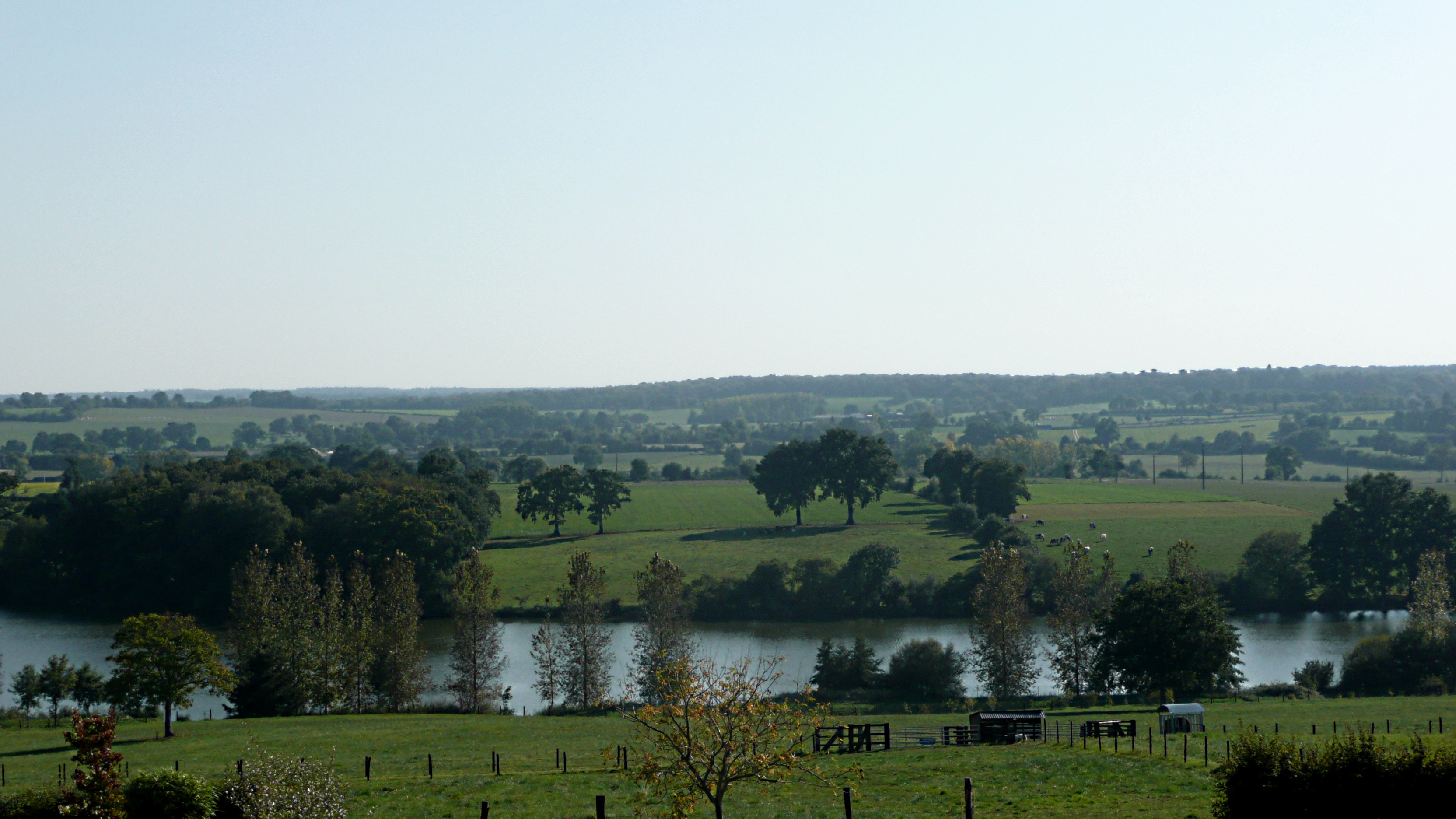 Paysage du Haut-Anjou sur la commune de Pouancé. Prise en haut d'une ligne de crête vers la vallée. L'étang de Tressé formé par la Verzée se forme en contrebas. En arrière plan, deux lignes de crêtes.